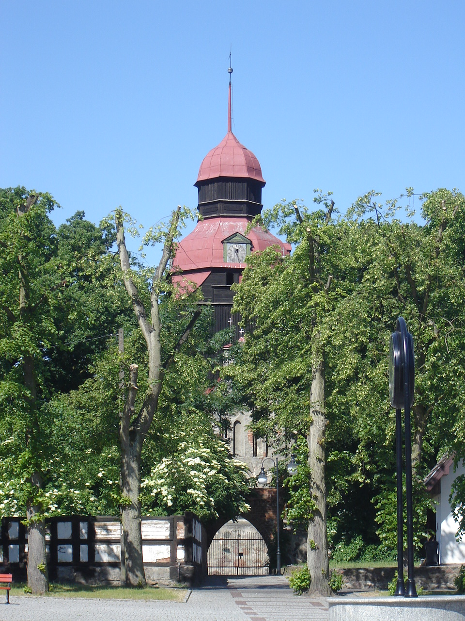 Kościół p.w Matki Boskiej Nieustającej Pomocy w Suchaniu (XV-wieczna budowla z głazów narzutowych, zabytek nr rejestr. A-291)